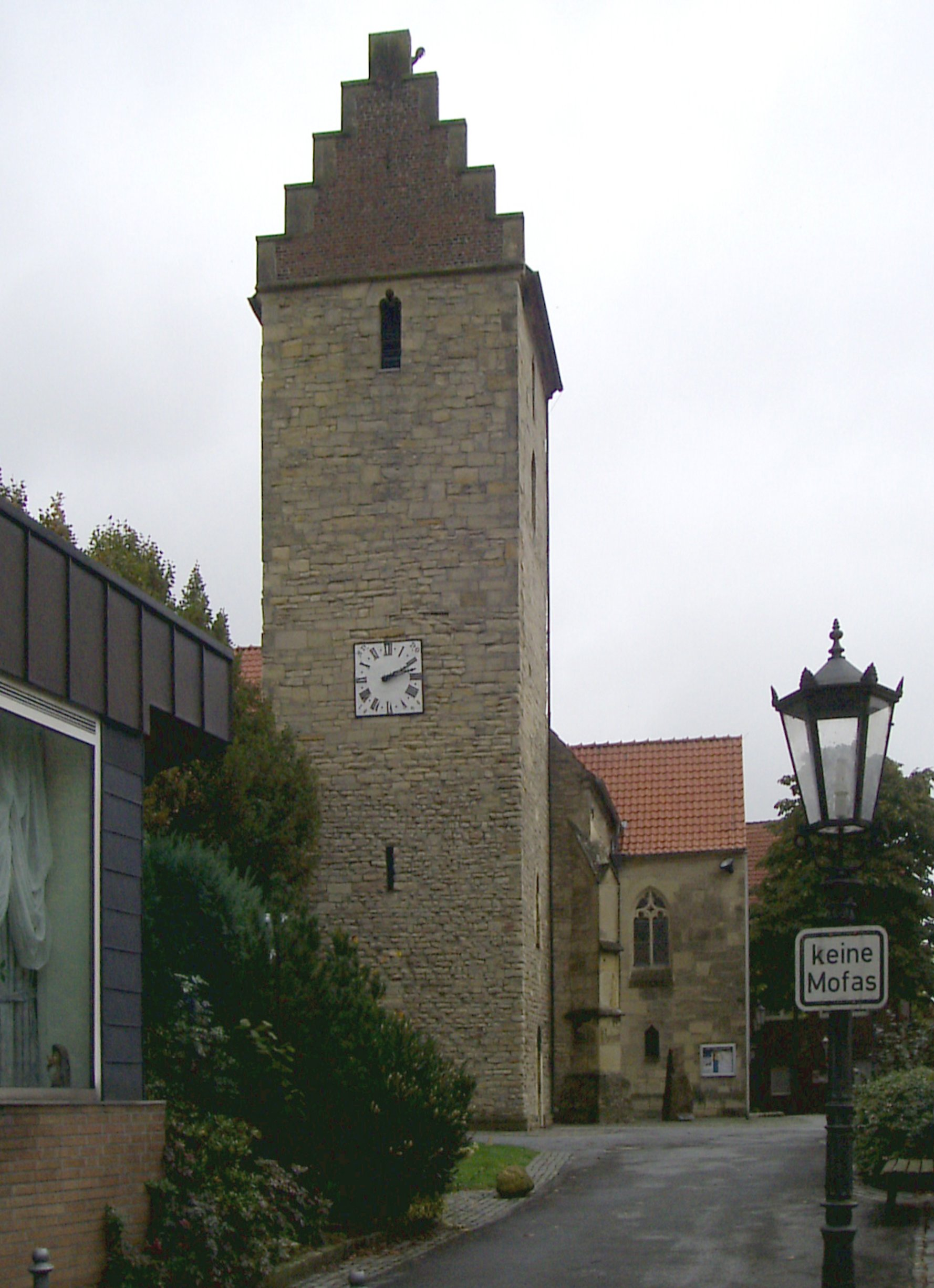 katholische Kirche in Schapdetten